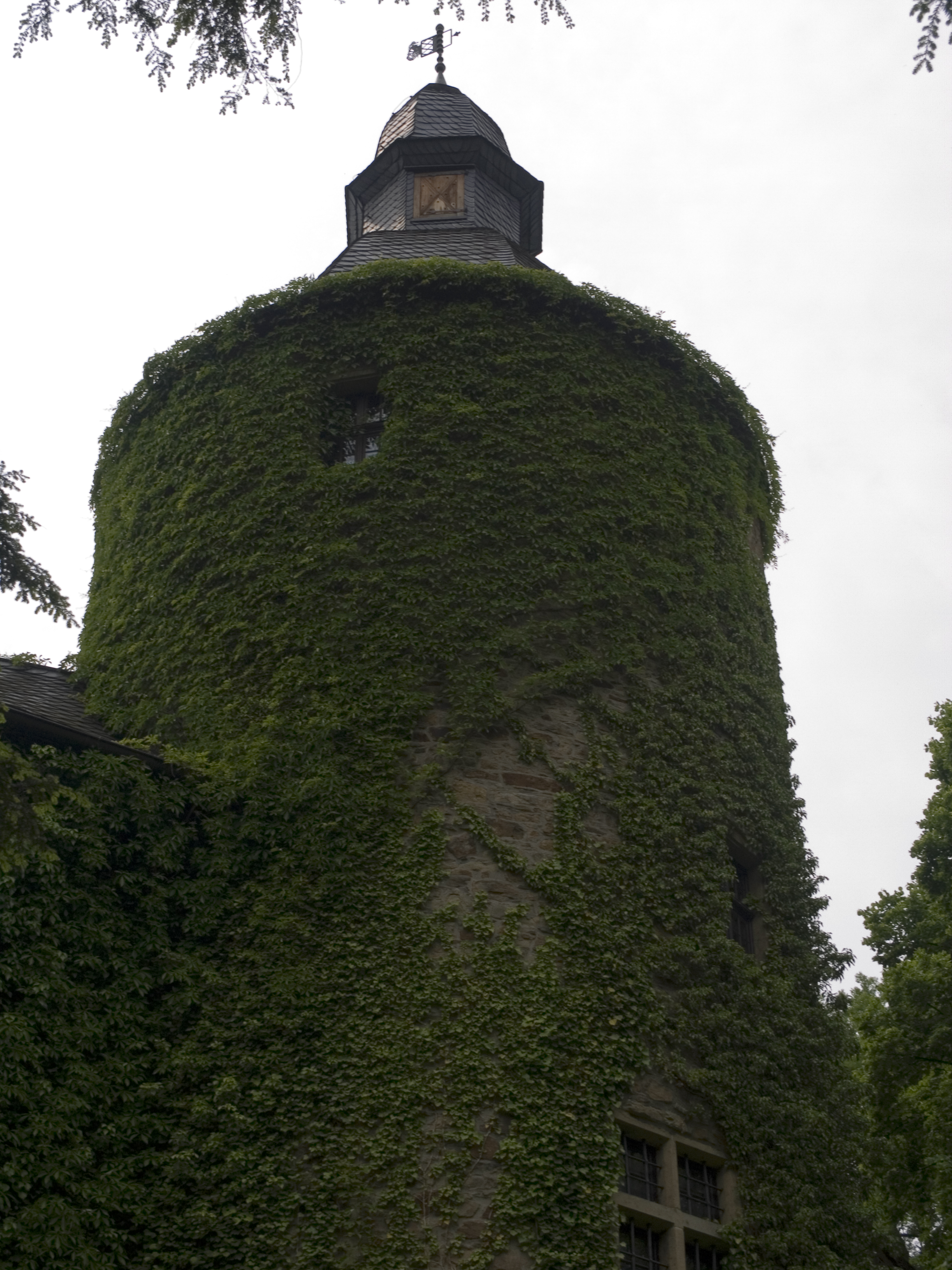 Северный Рейн-Вестфалия, Ратинген - Замок Ландсберг